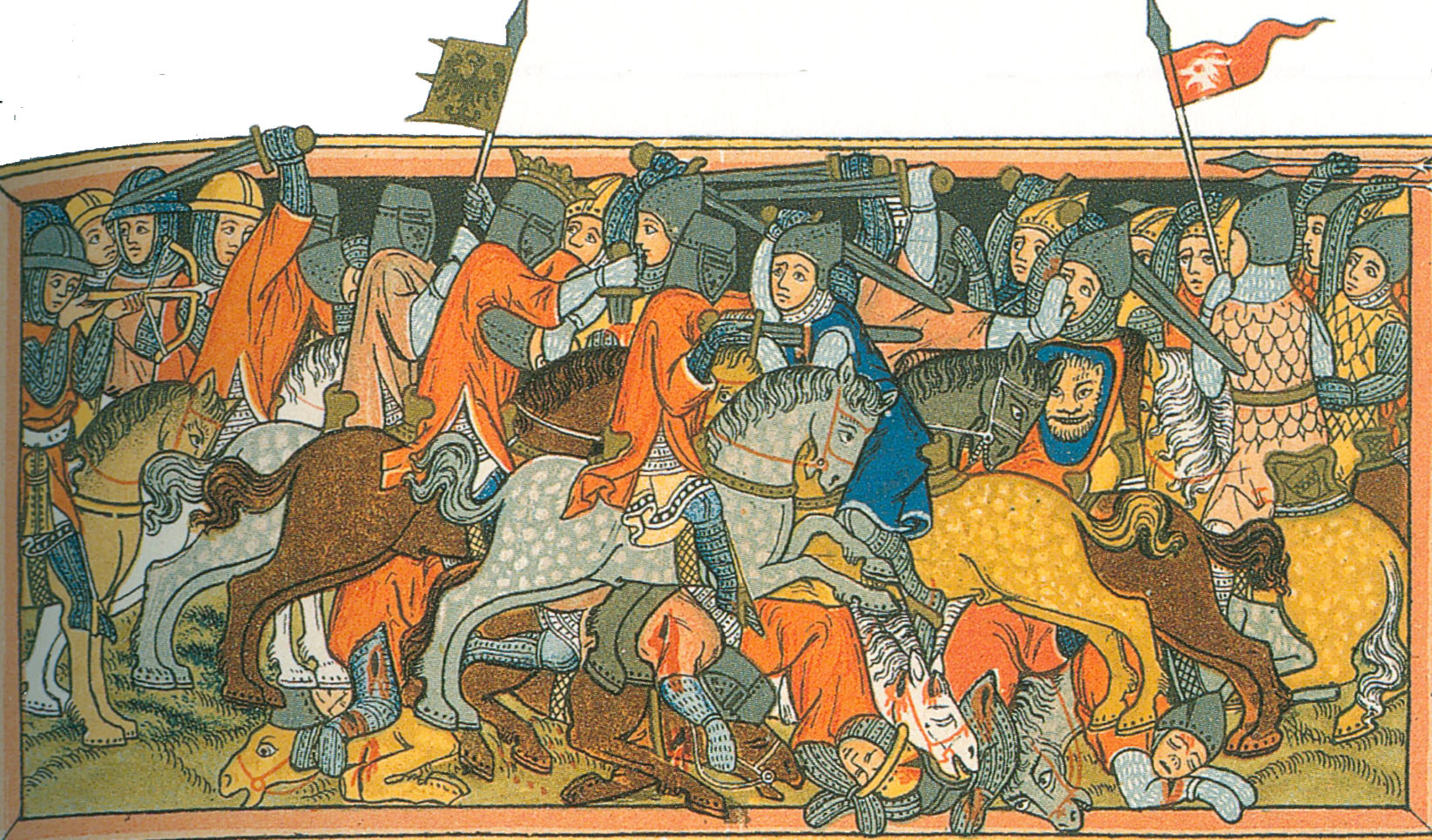 Kampf Ks. Karls d. Gr. gegen die Heiden [Hie strit der kuning karl mit den heydenen.] Darstellung um 1334 (fälschlich auch als "Schlacht bei Mühldorf" bezeichnet) aus einer Handschrift des Ritterromans Willehalm, vom Landgrafen von Hessen in Auftrag gegeben. Robert Freyhan, Die Illustrationen zum Casseler Willehalm-Codex. Ein Beispiel englischen Einflusses in der rheinischen Malerei des XIV. Jahrhunderts, Marburg 1927.